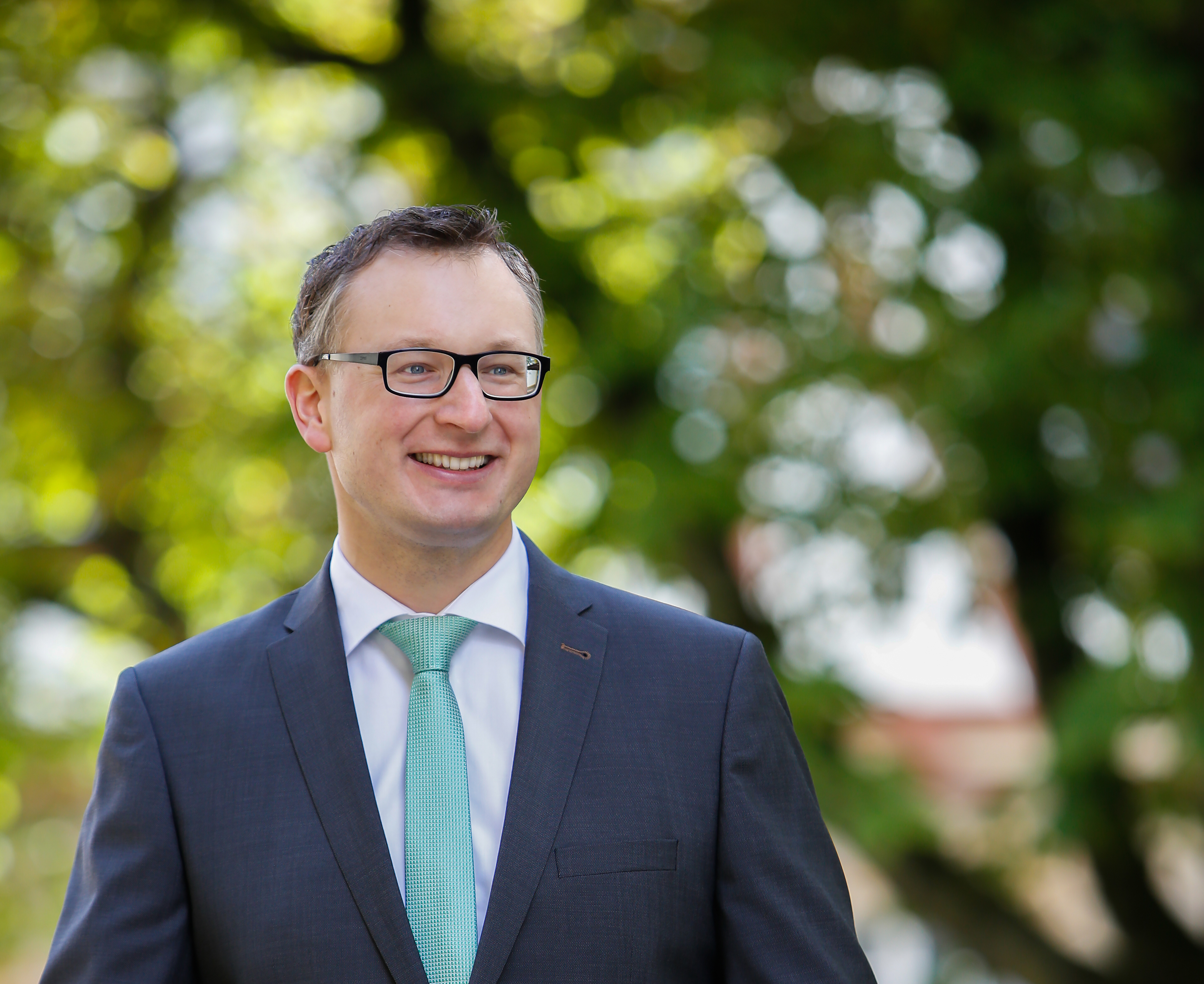 Andreas Schwarz MdL in seinem Wahlkreis Kirchheim unter Teck Lena Lux Fotografie